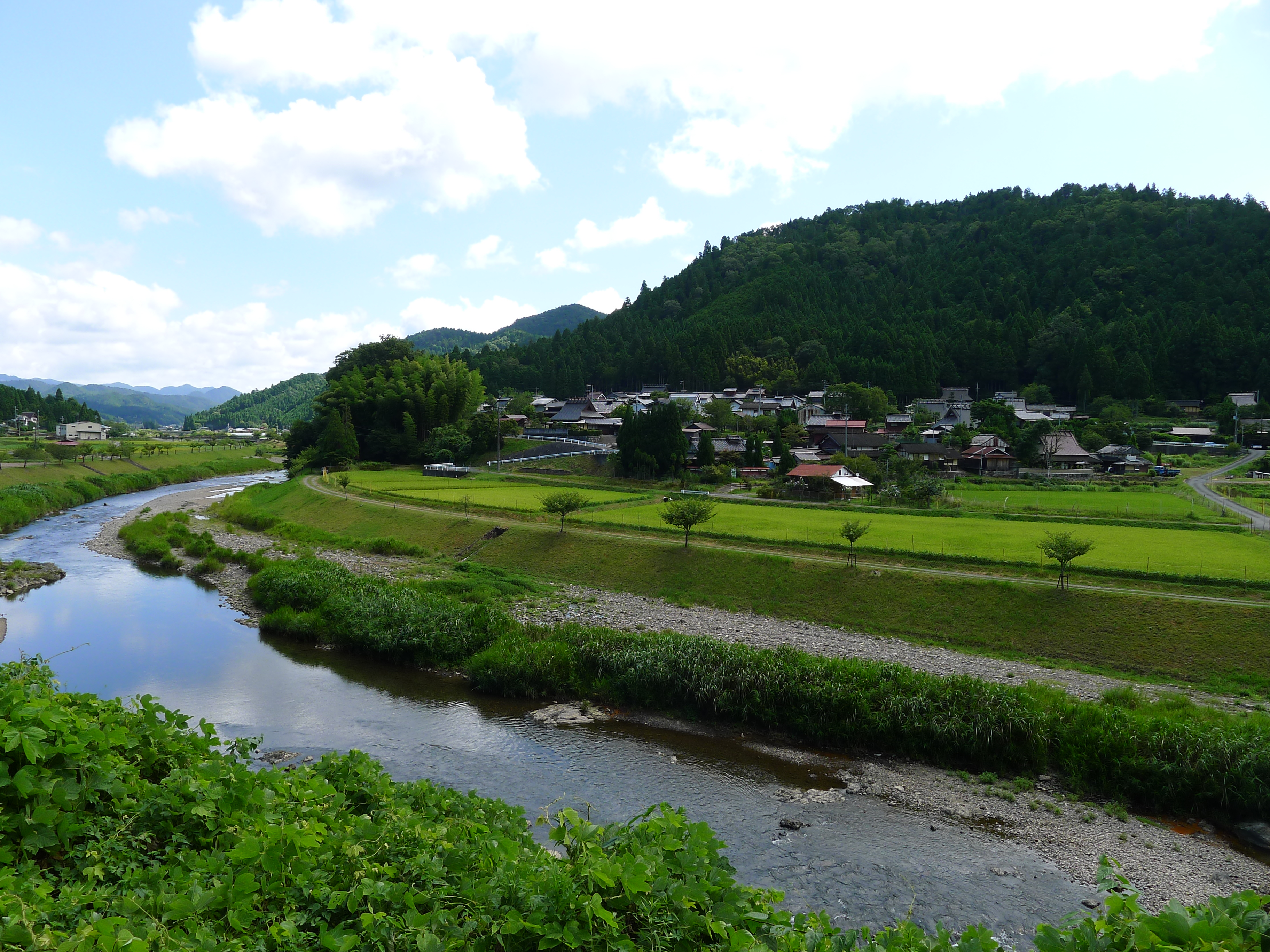 平安京造営の杣となった山国荘（京都市右京区京北町）